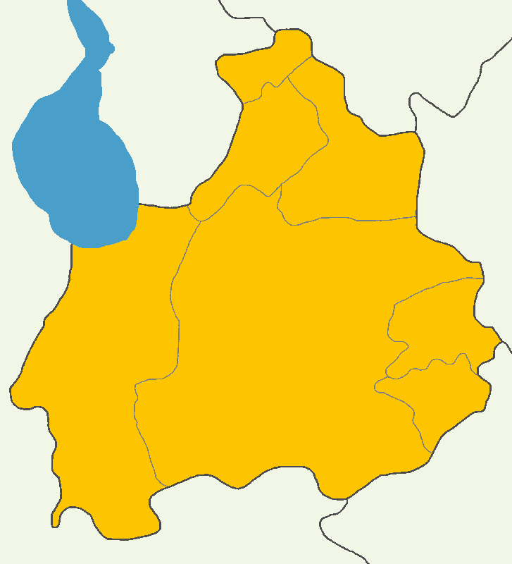 Aksaray'da 2014 Türkiye cumhurbaşkanlığı seçimi sonuçları